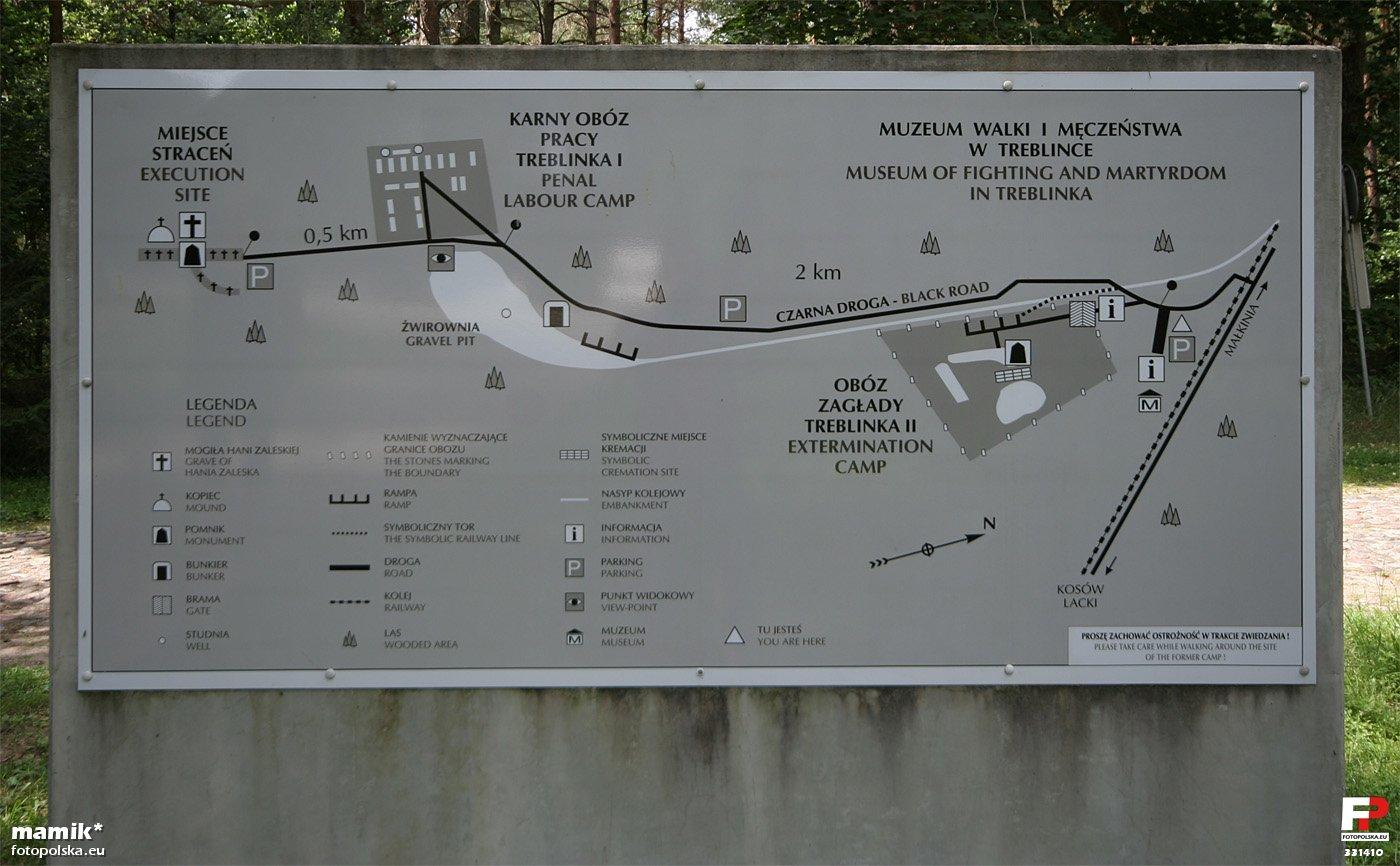 Tablica z planem całego muzeum